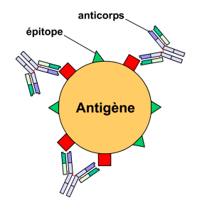 Schéma d'anticorps monoclonaux Auteur : Yohan Source : Crée avec Flash5 Licence : GFLD Yohan